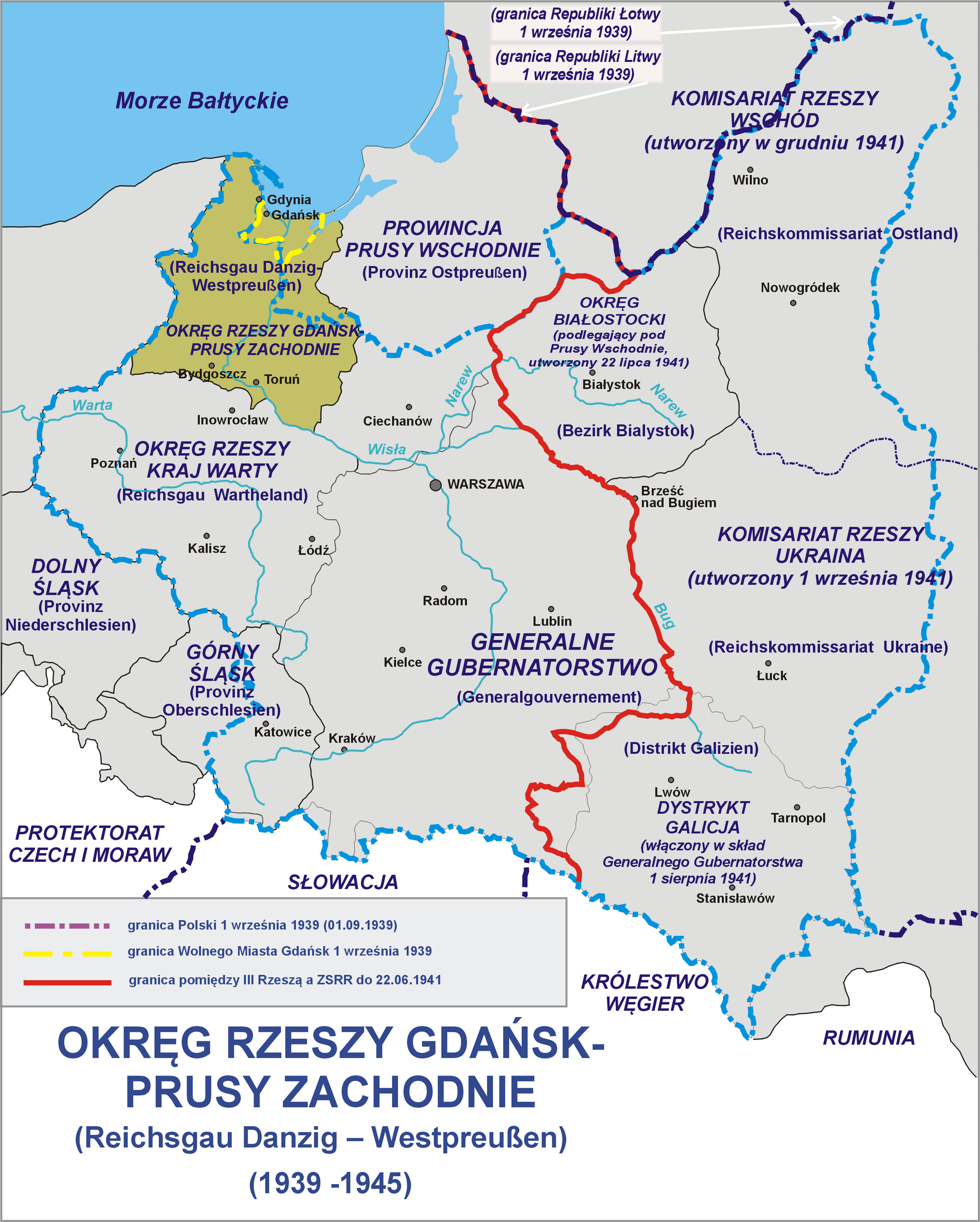 Okręg Rzeszy Gdańsk - Prusy Zachodnie (Raichsgau Danzig - Westpreussen) 1939 -1945